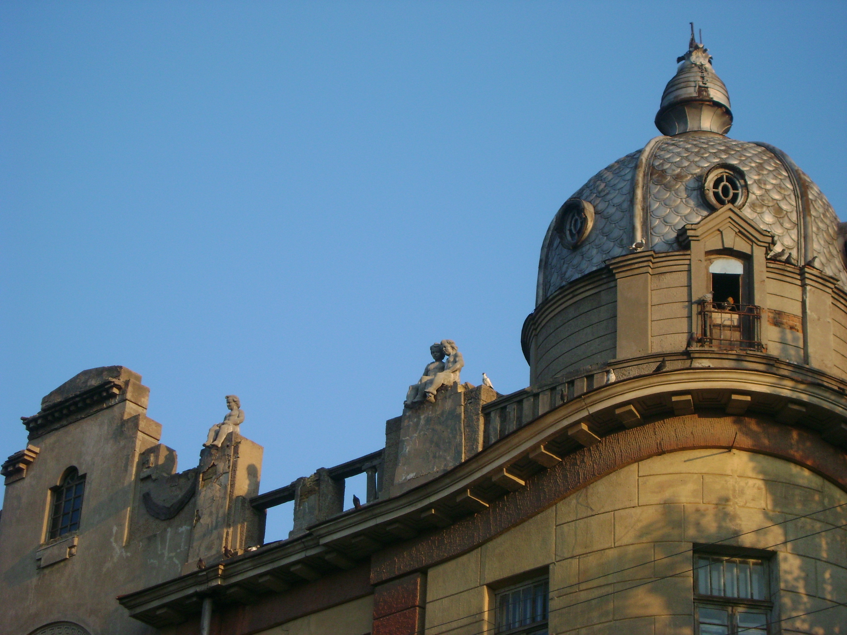 Готель “Європейський” ( нині - готель “1 Травня” ), Херсон, Леніна вул., 26